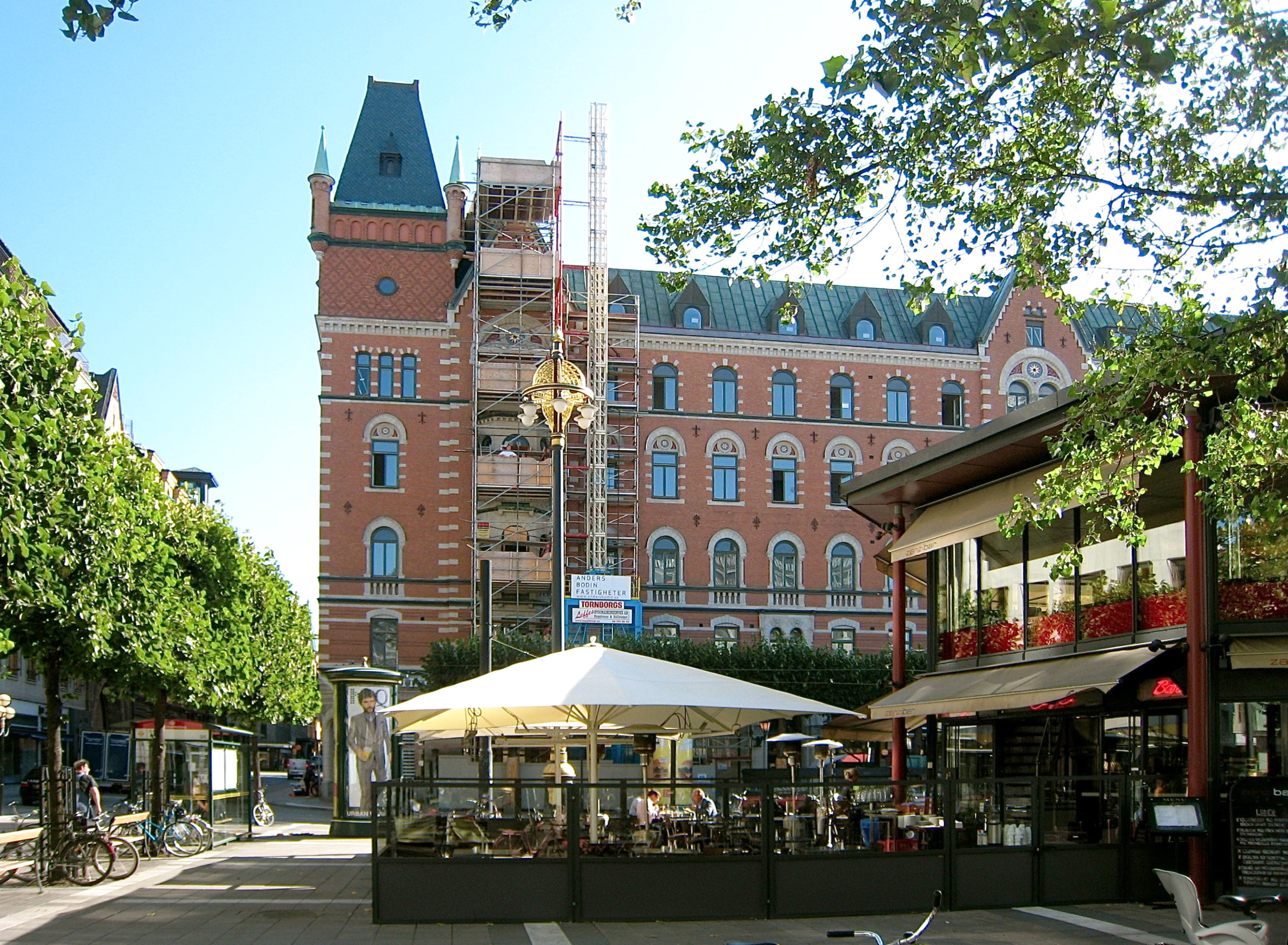 Skravelberget mindre 9 och Palmhuset